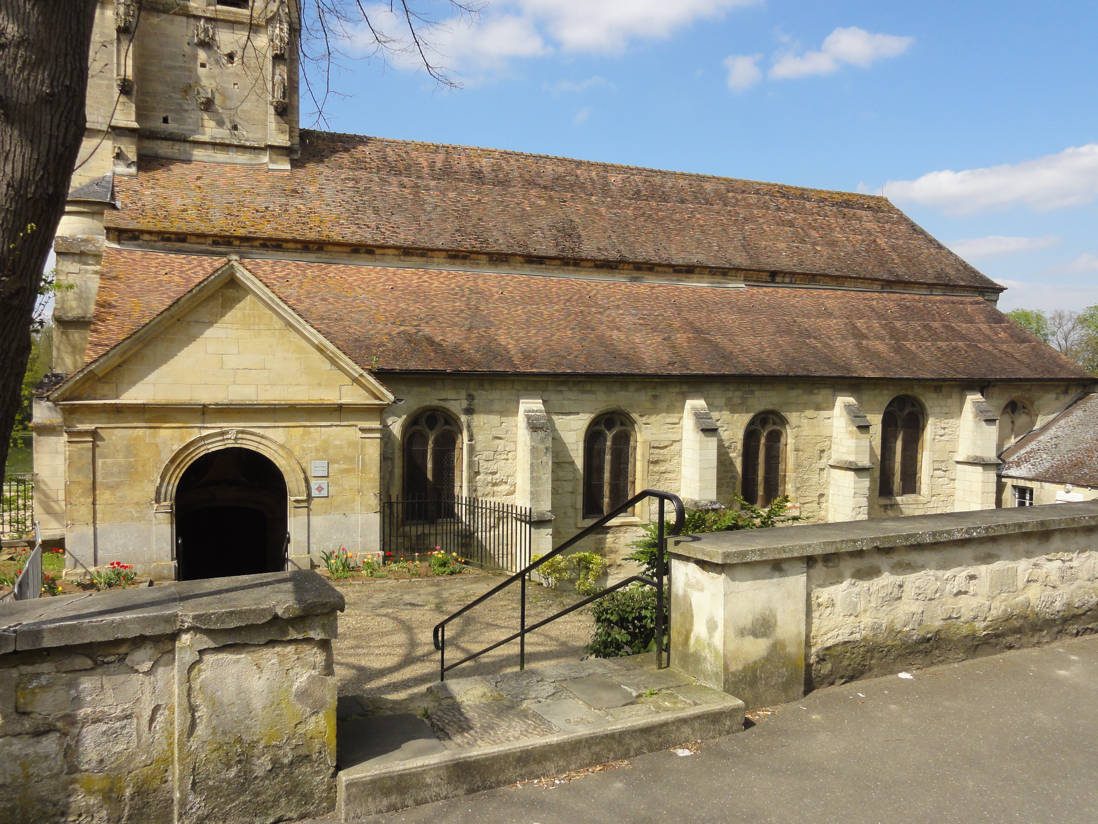 Église Saint-Denis de Méry-sur-Oise - voir titre.